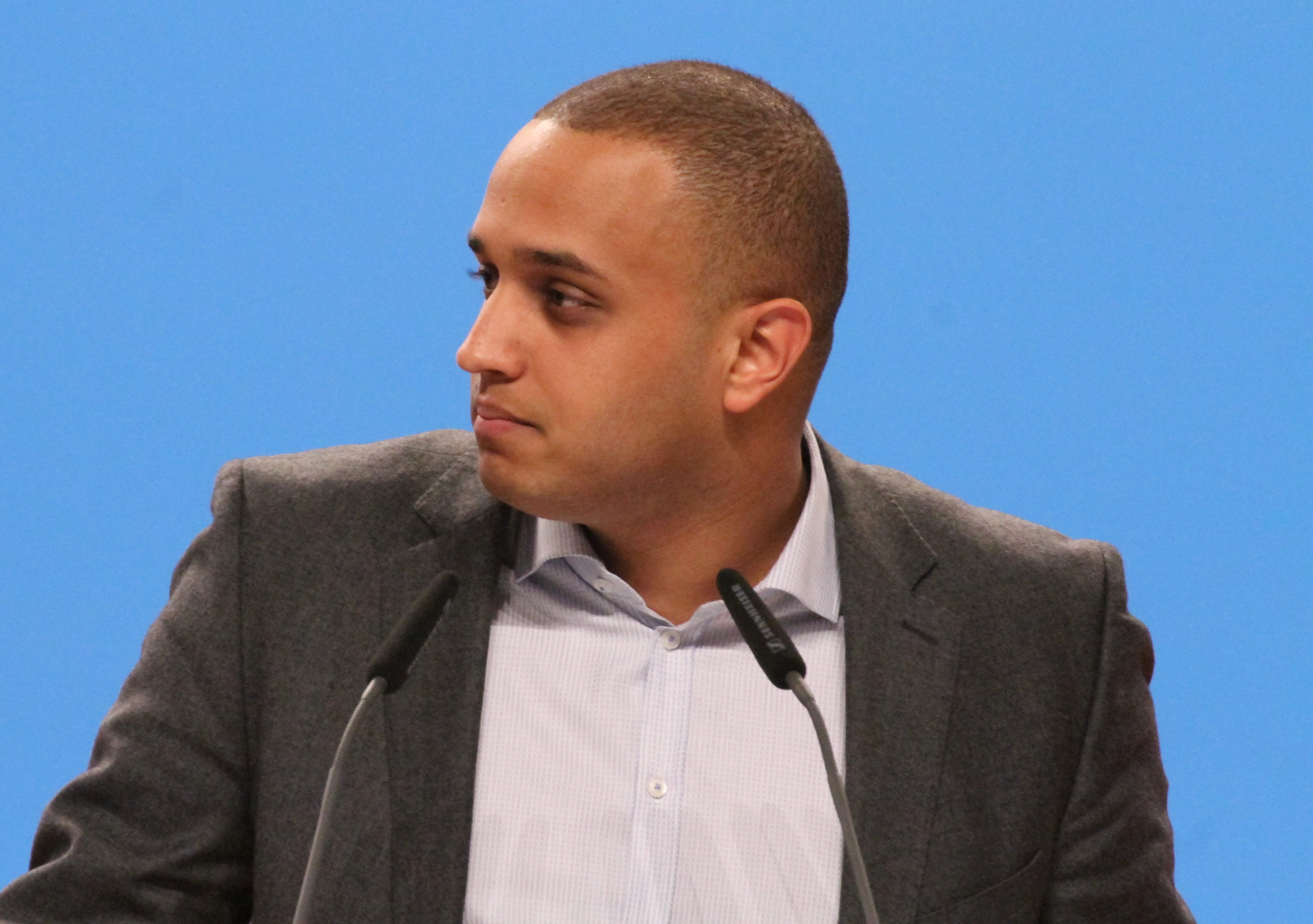 Younes Ouaqasse auf dem CDU Bundesparteitag Dezember 2014 in Köln